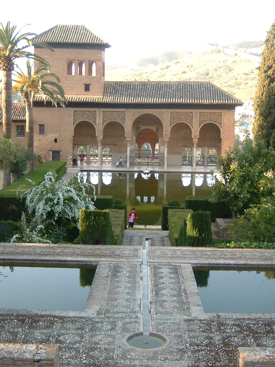 Giardino dell' Alhambra